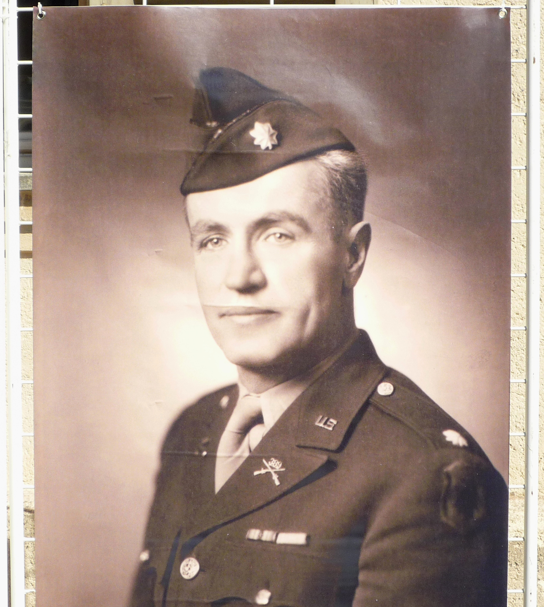 Lieutenant-Colonel Philip Johnson US army. Débarqué en Provence le 15 août 1944.